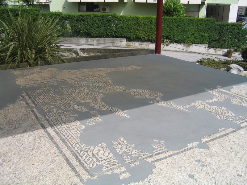 Oderzo (Provincia di Treviso, Veneto, Italia). Percorso archeologico di Via dei Mosaici.